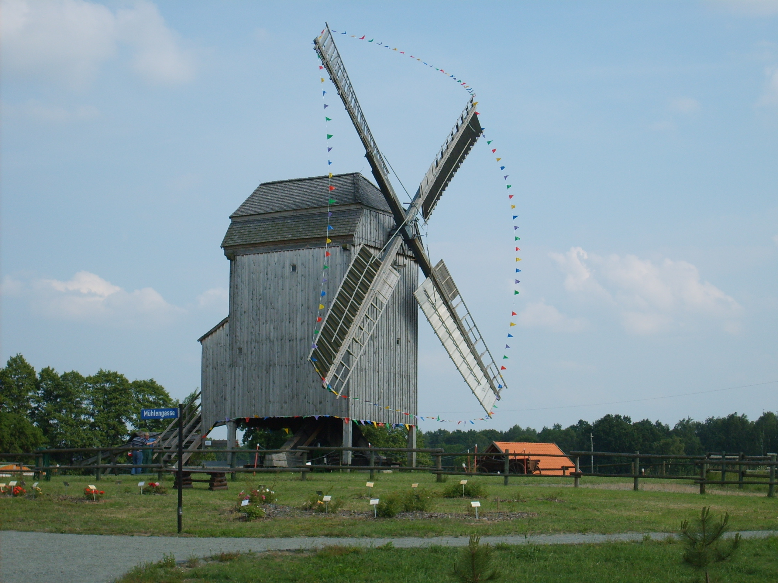 Ansicht Bockwindmühle Elsterwerda